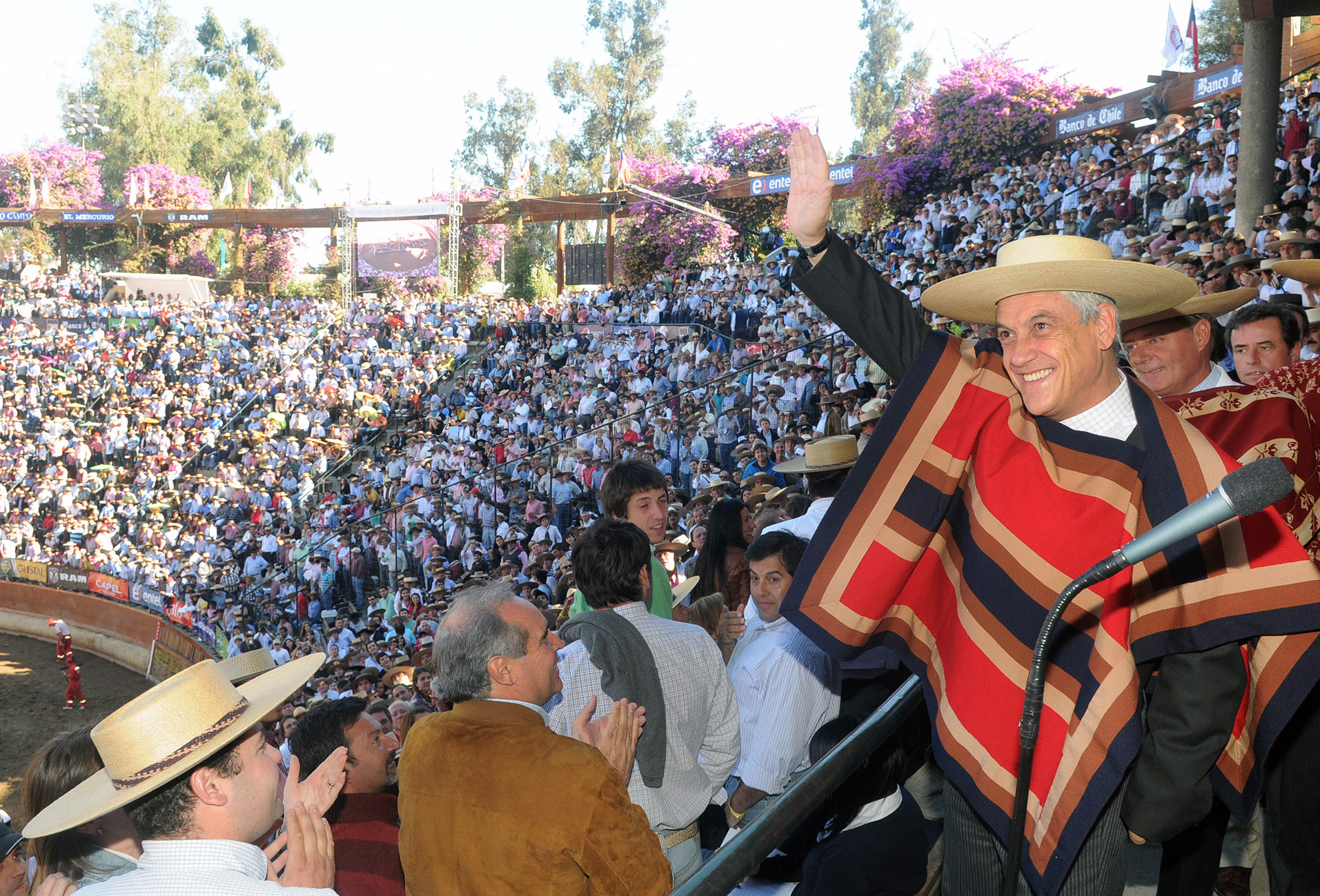 Presidente Piñera asiste al Champion de Rancagua.